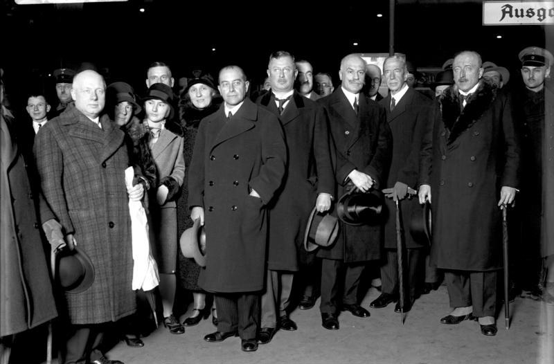 Abreise der deutschen Delegation zur Haager Conferenz! Unter Führung des deutschen Reichsaussenministers Dr. [Julius] Curtius! v.li.n.re.: Reichsfinanzminster [Paul] Moldenhauer, Reichsaussenminister Dr. [Julius] Curtius, Minister für das besetzte Gebiet Dr. [Joseph] Wirth, der zweite daneben der niederländische Gesandte in Berlin Graf [Johann] von Limburg-Stirum und Staatssekretär [Karl] von Schubert auf dem Bahnhof Friedrichsstrasse kurz vor der Abreise.